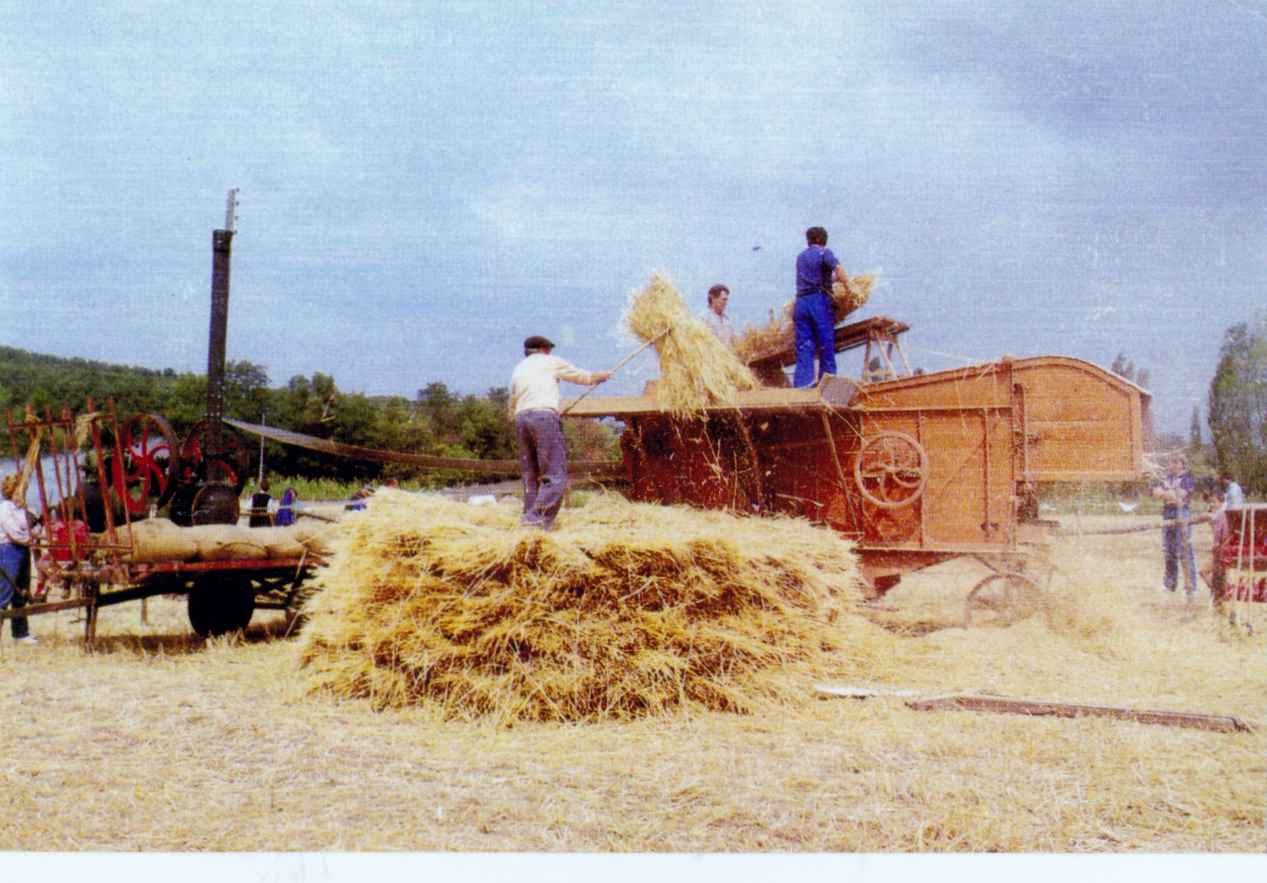 La batère